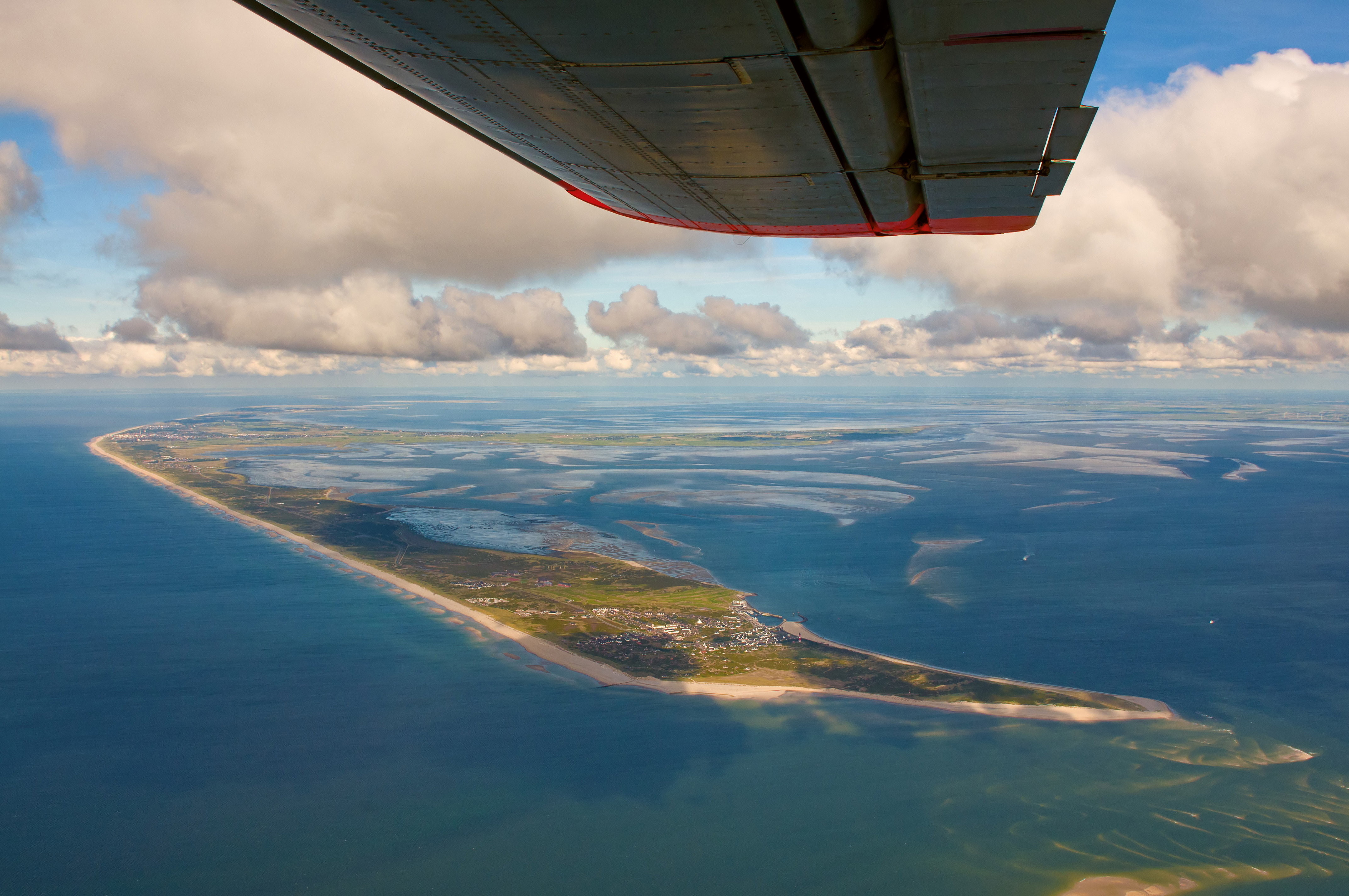 Fotoflug über das nordfriesische Wattenmeer - Sylt/Hörnum (von SSW)